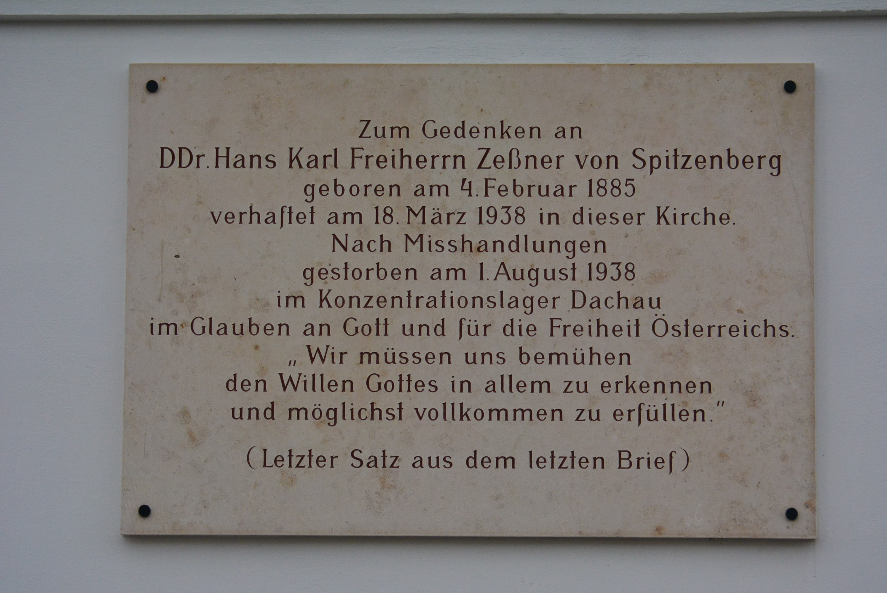 Gedenktafel für NS-Opfer (Wien, Ettingshausengasse 1, Hans Karl Zeßner-Spitzenberg)